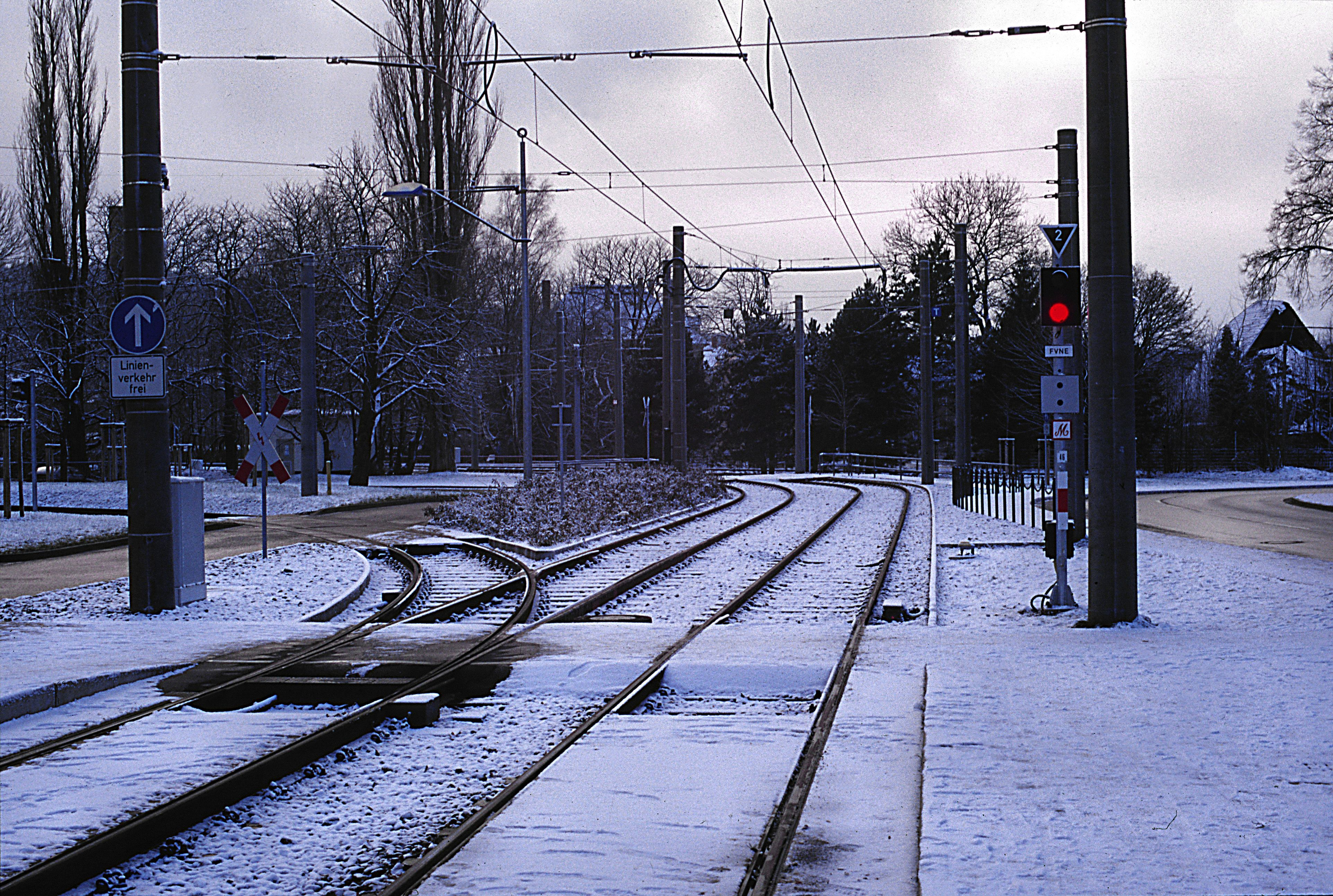 Altchemnitz, Richtung Stollberg (Sachs); Wechsel zwischen BO Strab und EBO, das Ausfahrsignal 46 ist dementsprechend eine recht wilde Kombination von Signalen aus mehreren Regelwerken.